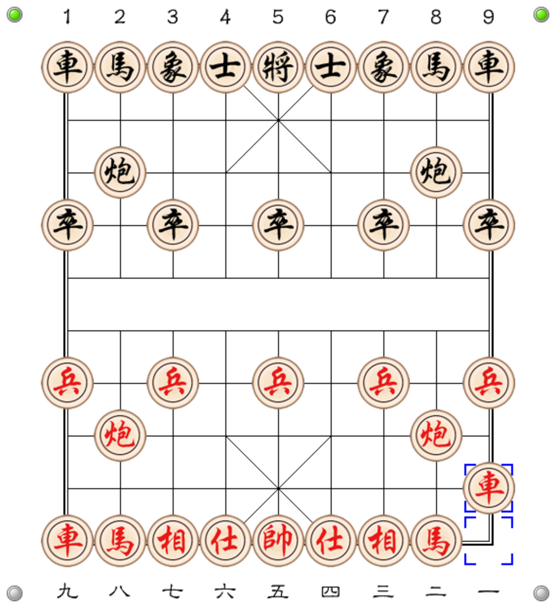 Thiết hoạt xa